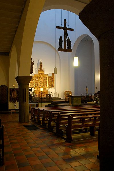 Blick in das neoromanische Innere der Lambertuskirche zu Erkelenz